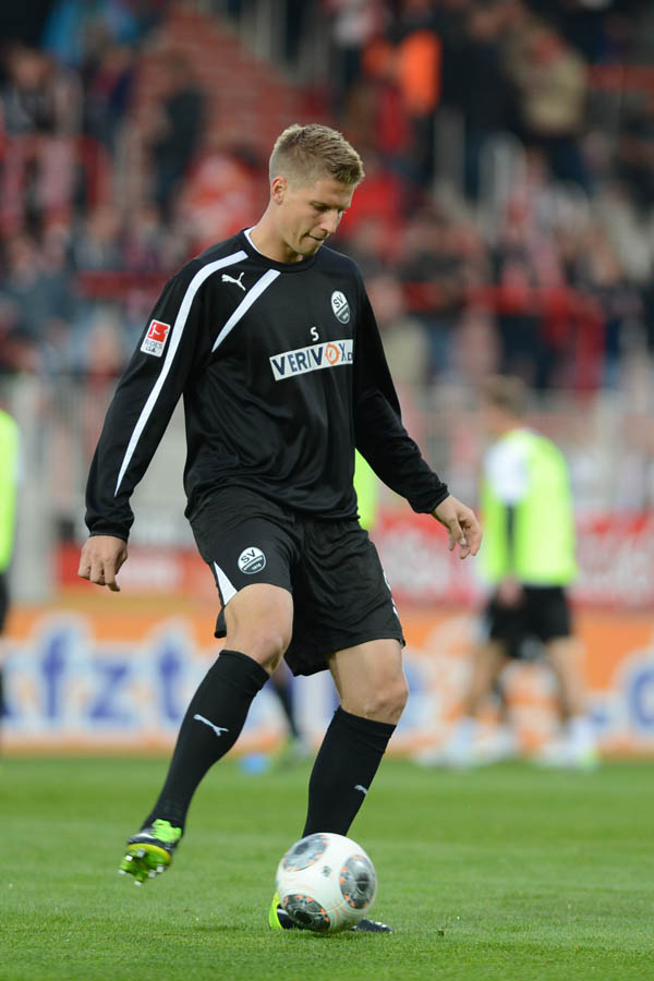 Ex-Unioner Daniel Schulz (jetzt SV Sandhausen) beim Aufwärmen